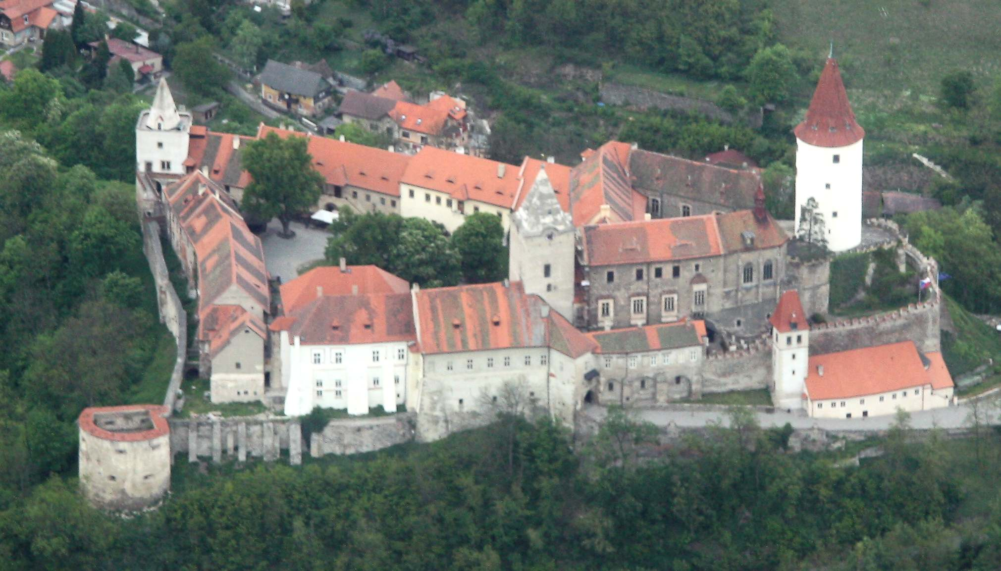 Letecký pohled na Křivoklát